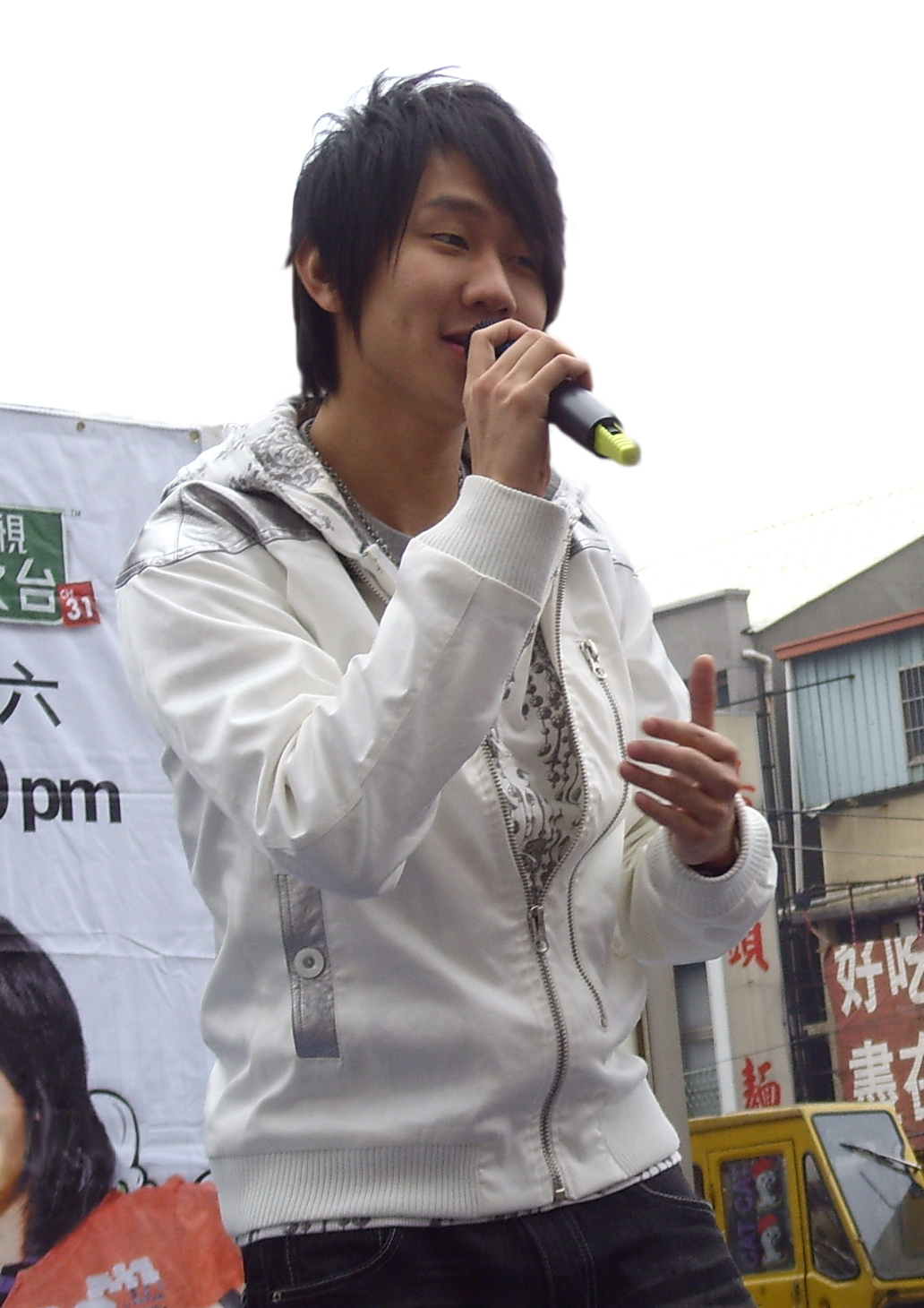 林俊傑，原來我不帥電視原聲帶簽唱會